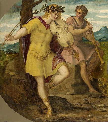 Apollon joue de la lyra da braccio et Marsyas du pommer.